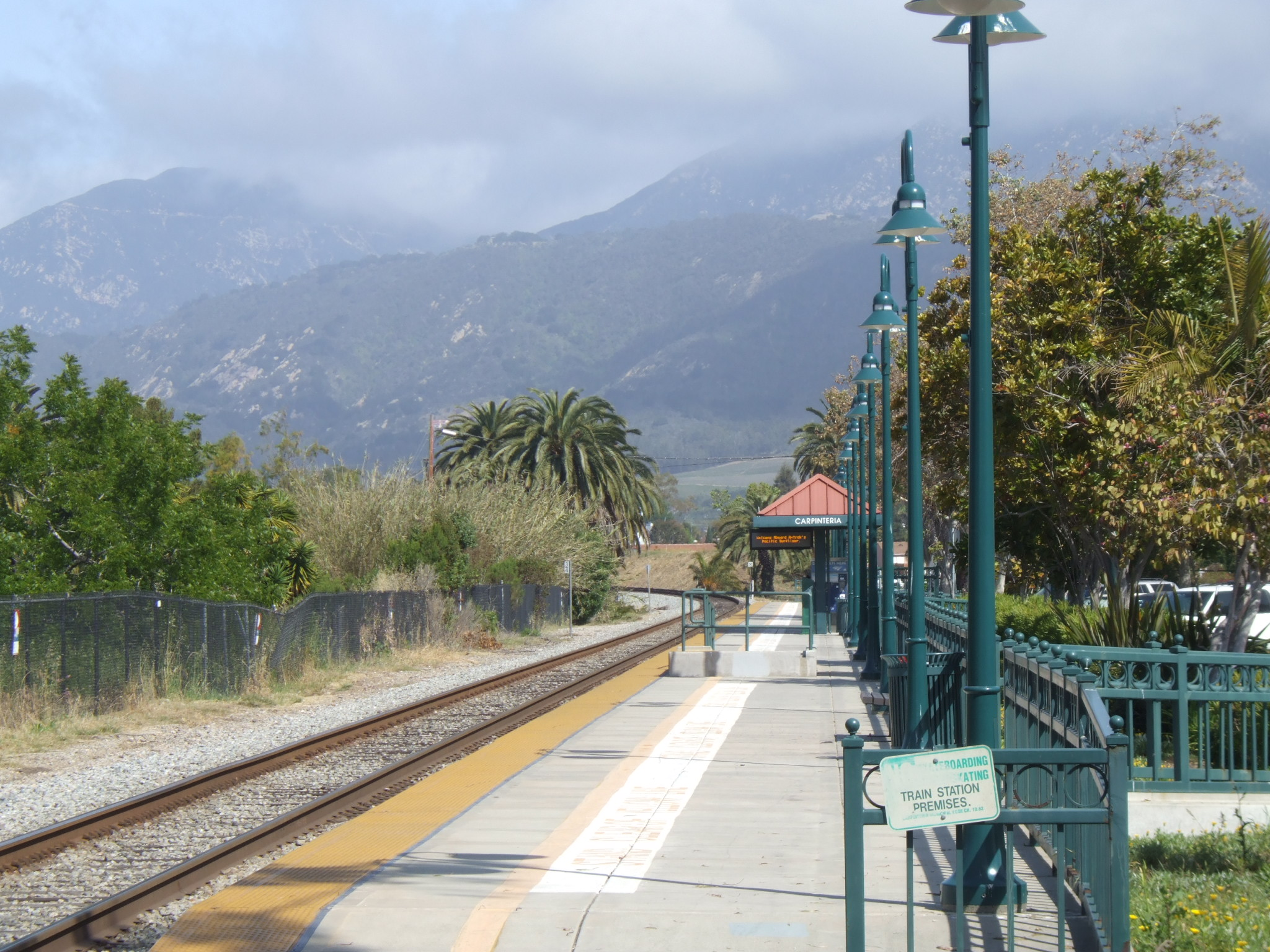 Carpinteria17